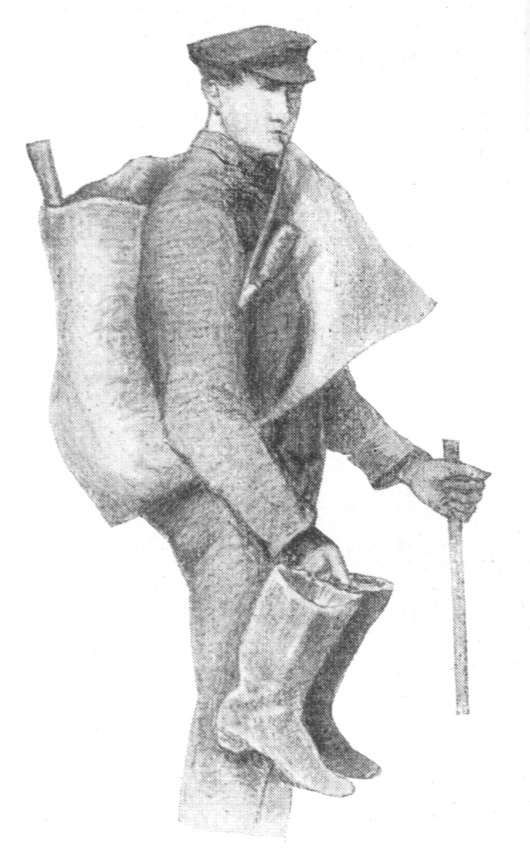 Originalbildunterschrift: Bauer mit Quersack, vom Jahrmarkt heimkehrend. 1880